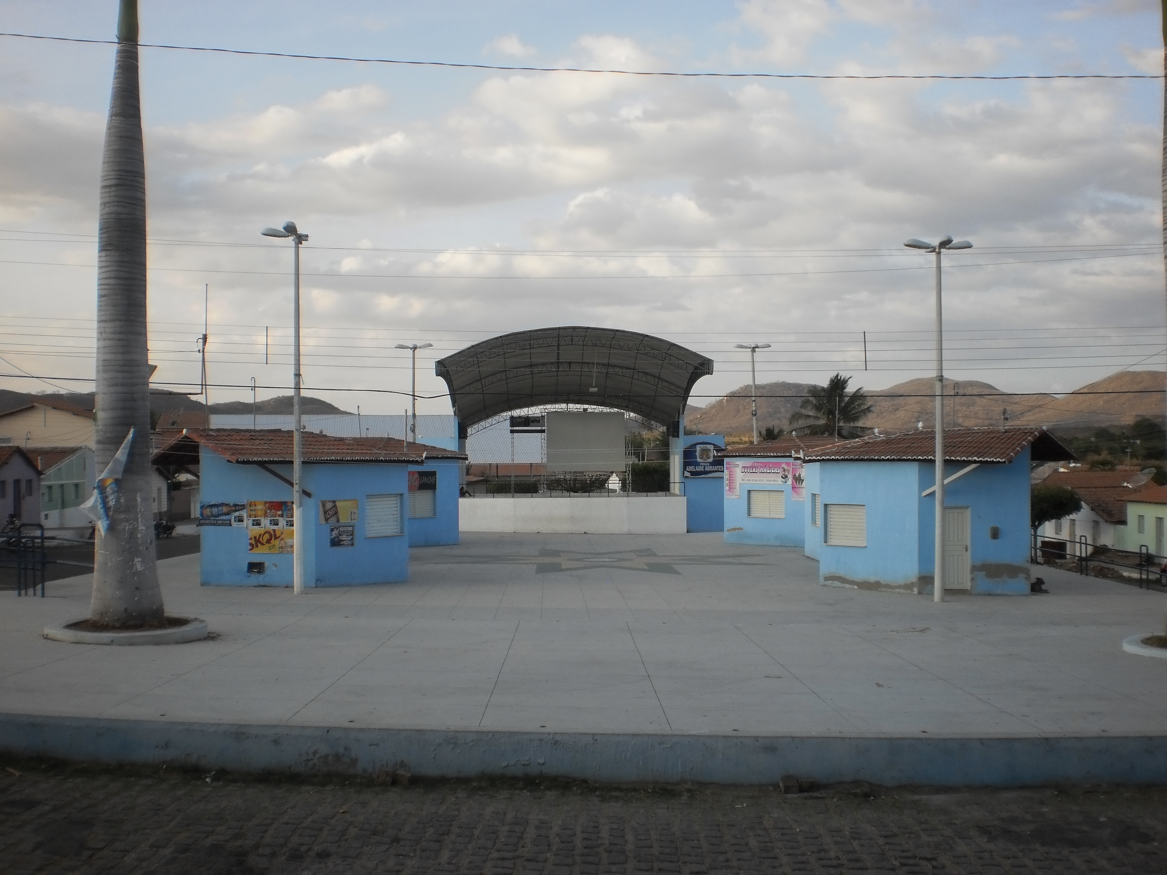 Praça de Eventos Adelaide Abrantes, em Doutor Severiano, Rio Grande do Norte, Brasil.